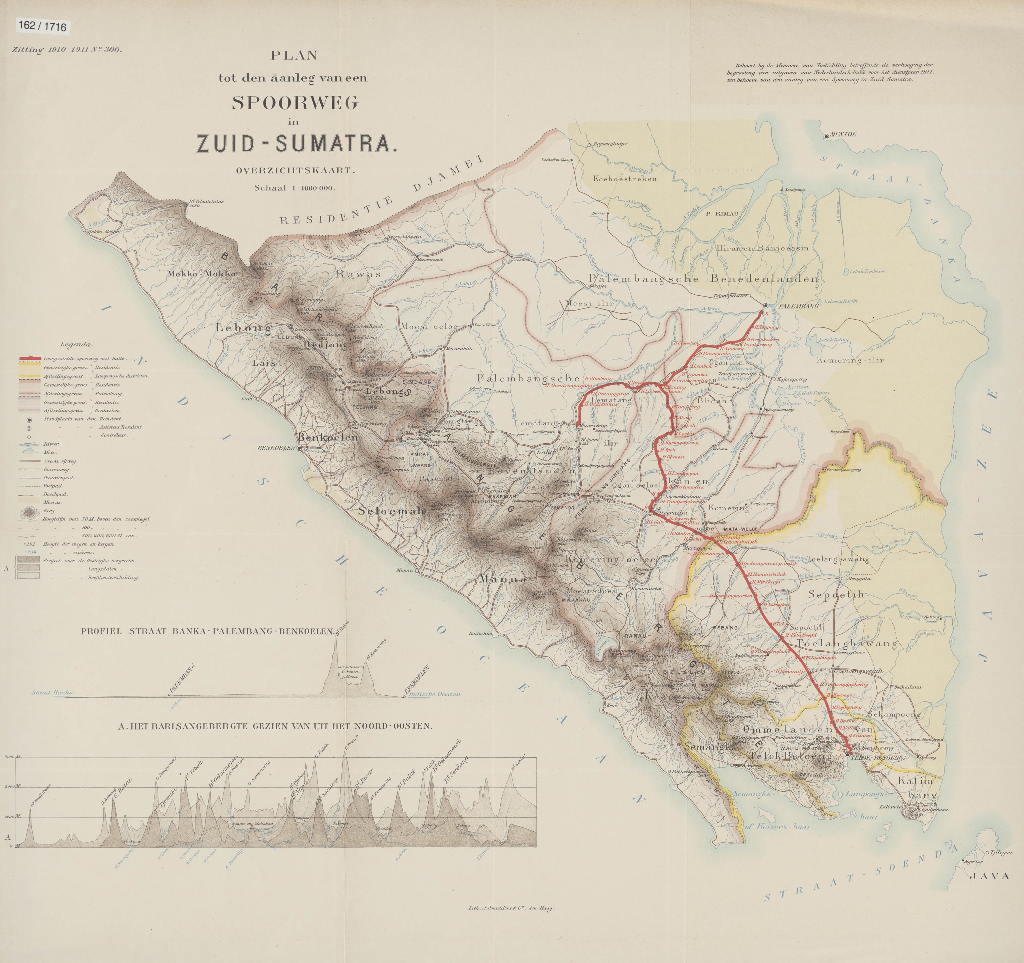 Behoort bij de Memorie van Toelichting betreffende de verhooging der begrooting van uitgaven van Nederlandsch-Indi voor het dienstjaar 1911, ten behoeve van den aanleg van een spoorweg in Zuid-Sumatra